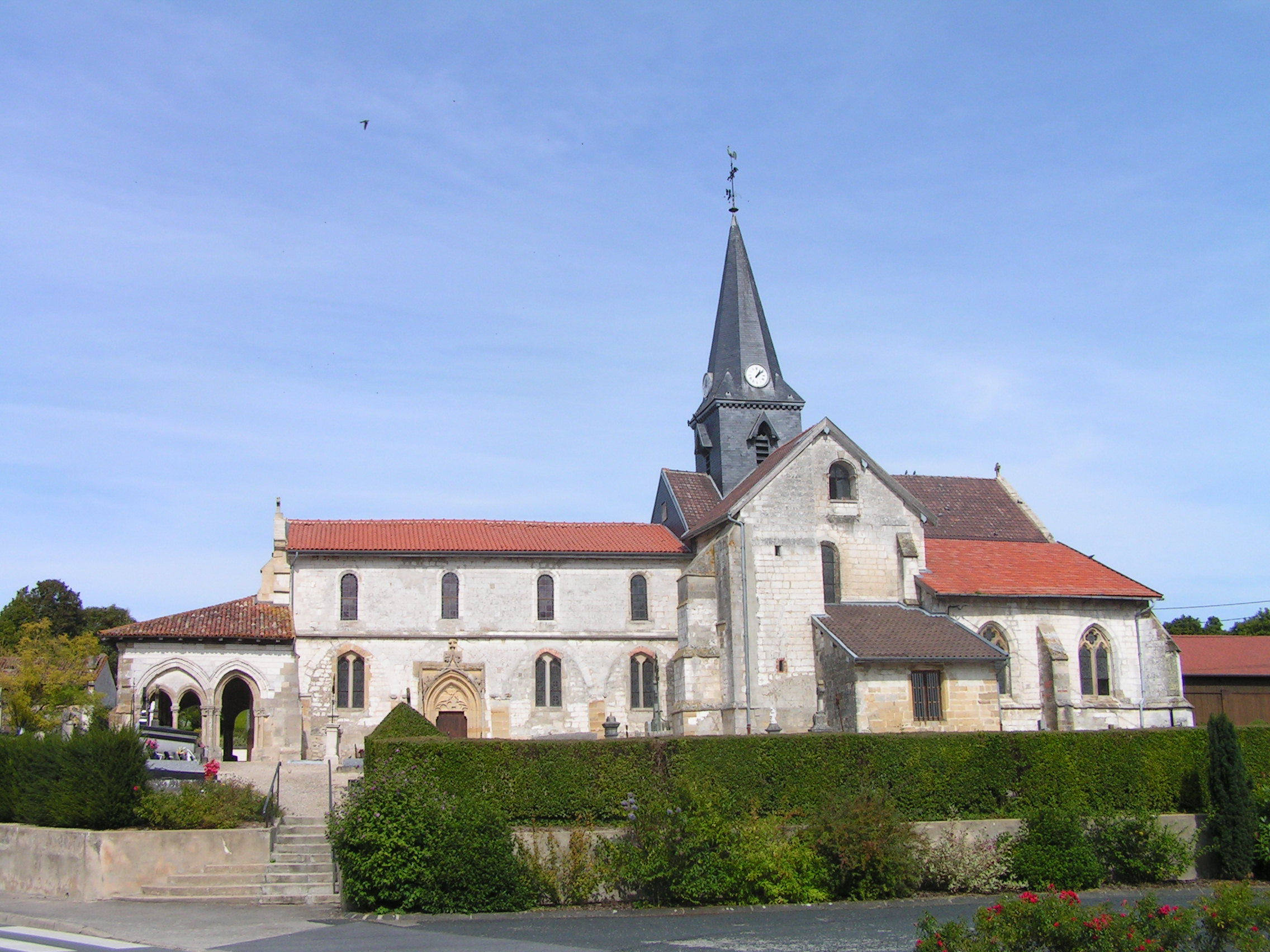 Église Saint-Memmies de Coupéville (Classé) .